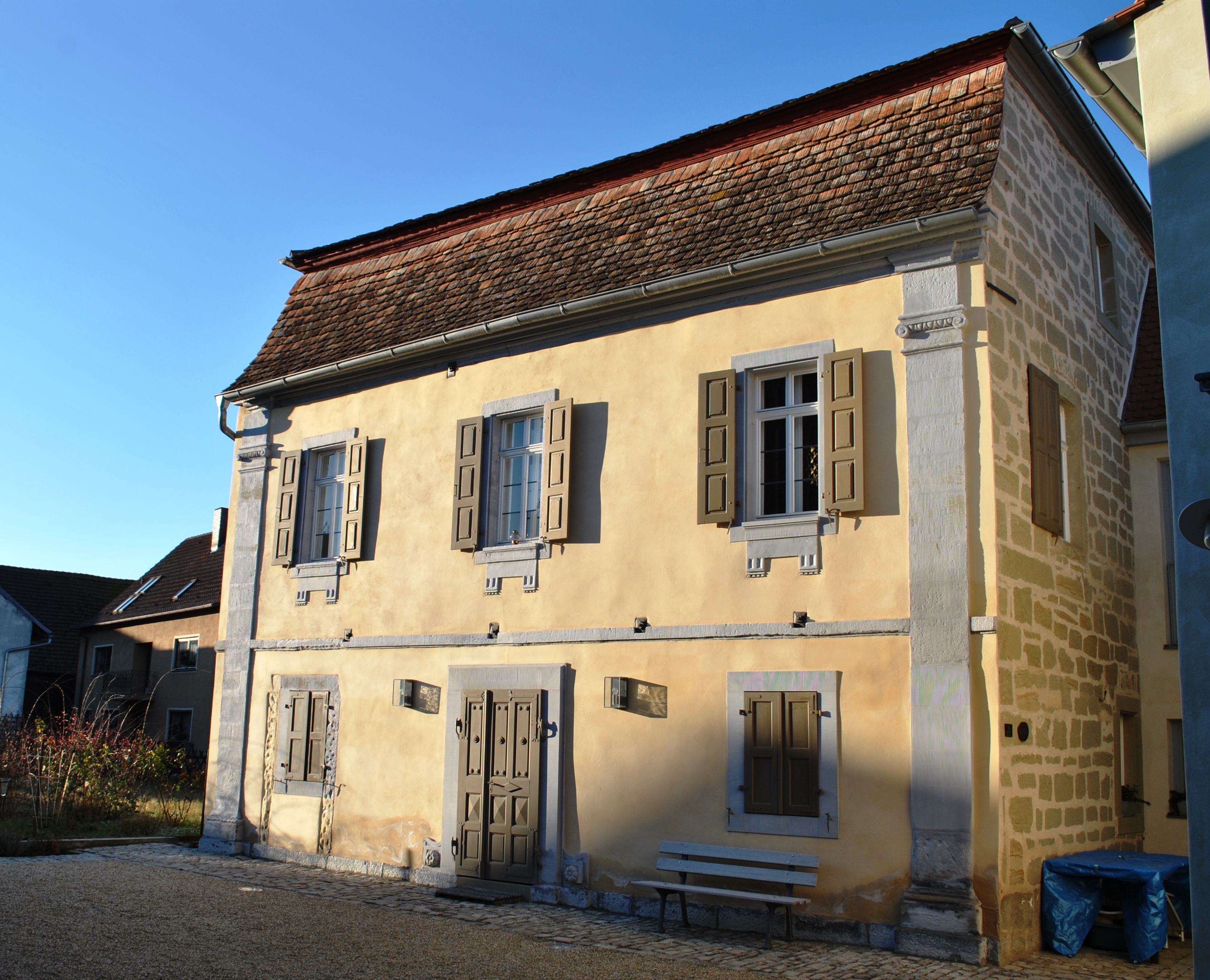 Ehemalige Synagoge Zweigeschossiger Mansardhalbwalmdachbau, 1792/93 D-6-75-177-23